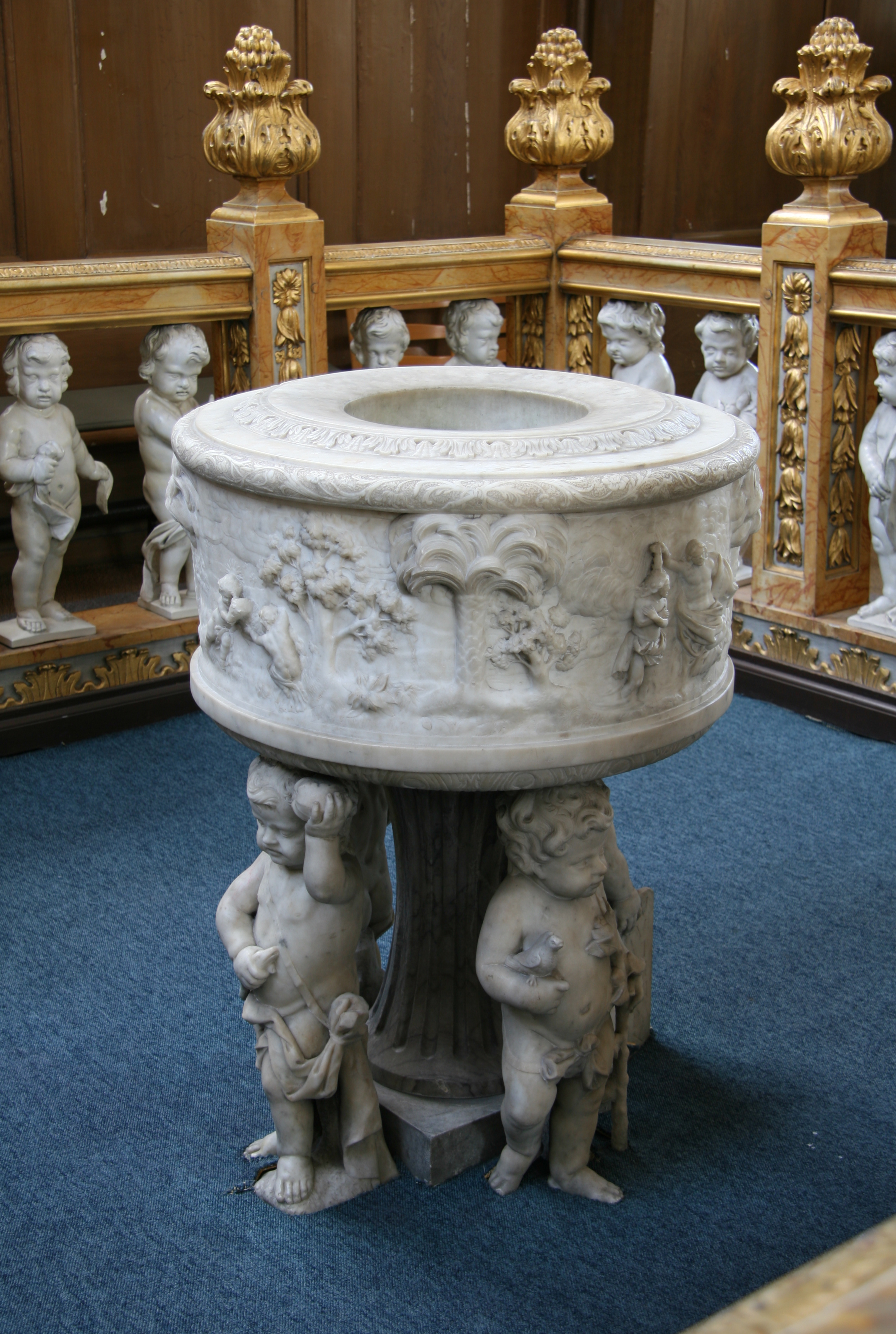 Vor Frelser Kirke (Church of Our Saviour), Copenhagen, Denmark. Baptismal font